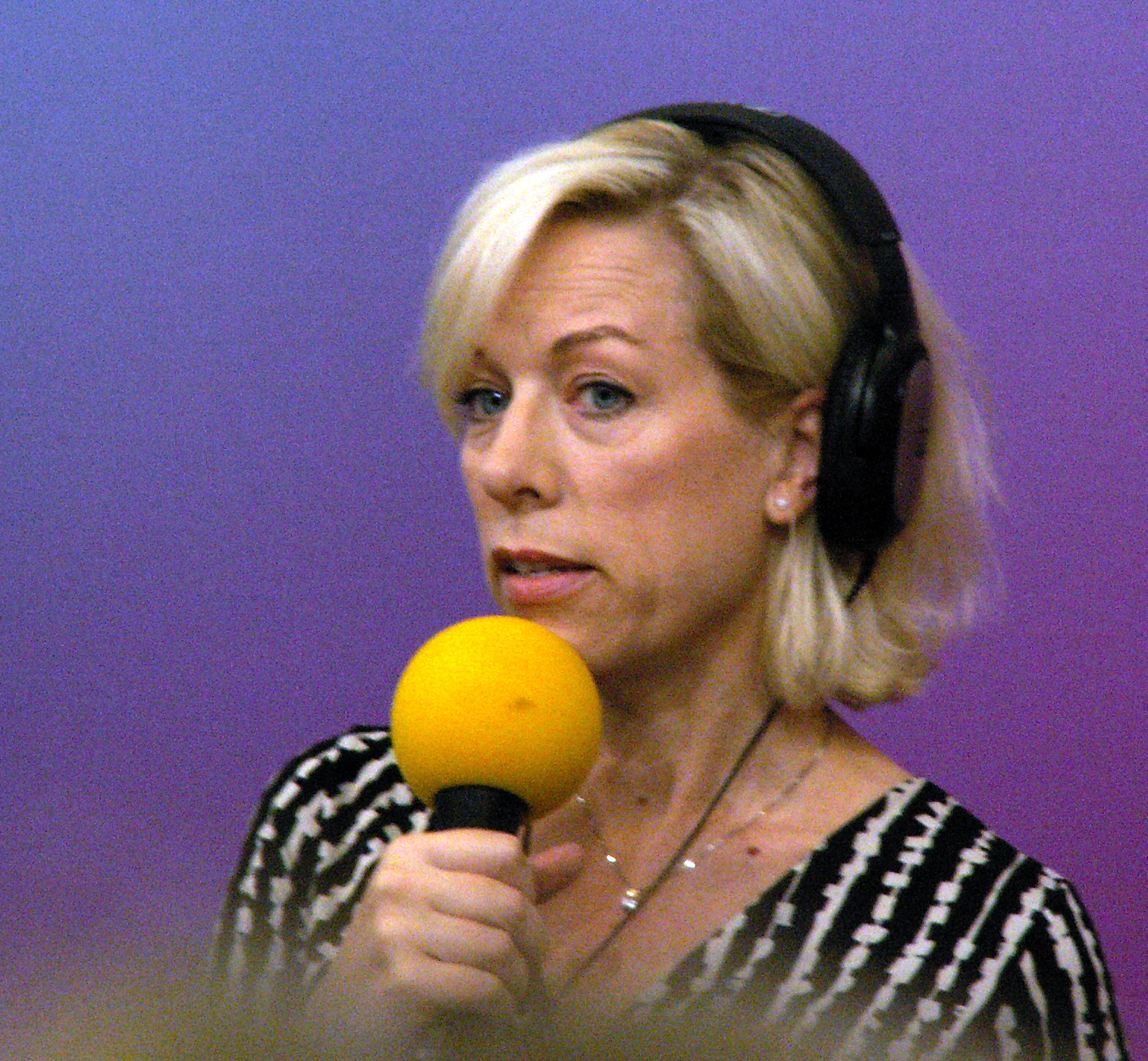 Studio Ett-inspelning på Bokmässan i Göteborg 2016, med Ginna Lindberg.